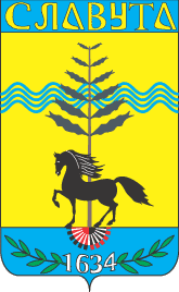 Герб міста Славута